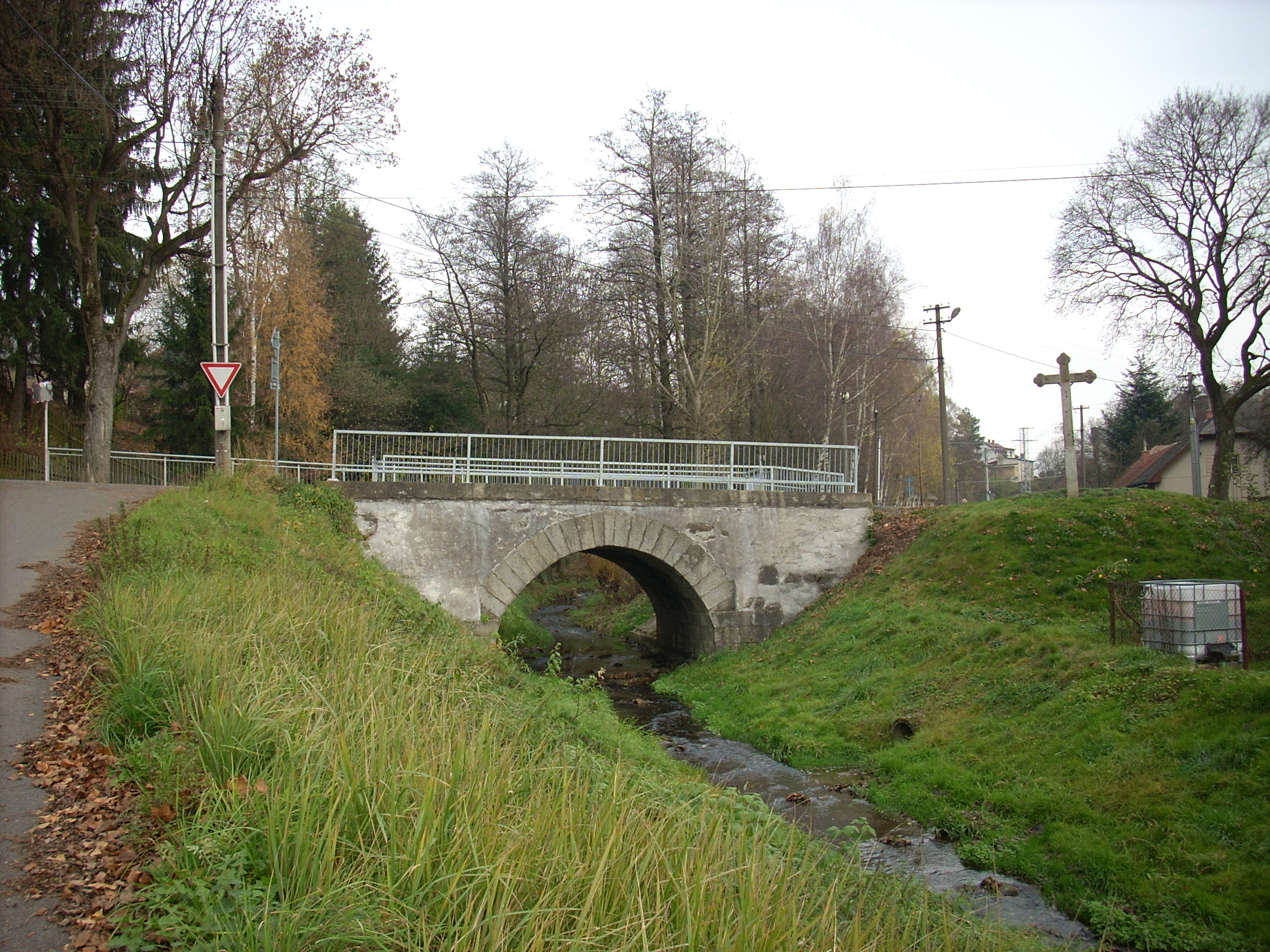 Nížkov, most přes Poděšínský potok